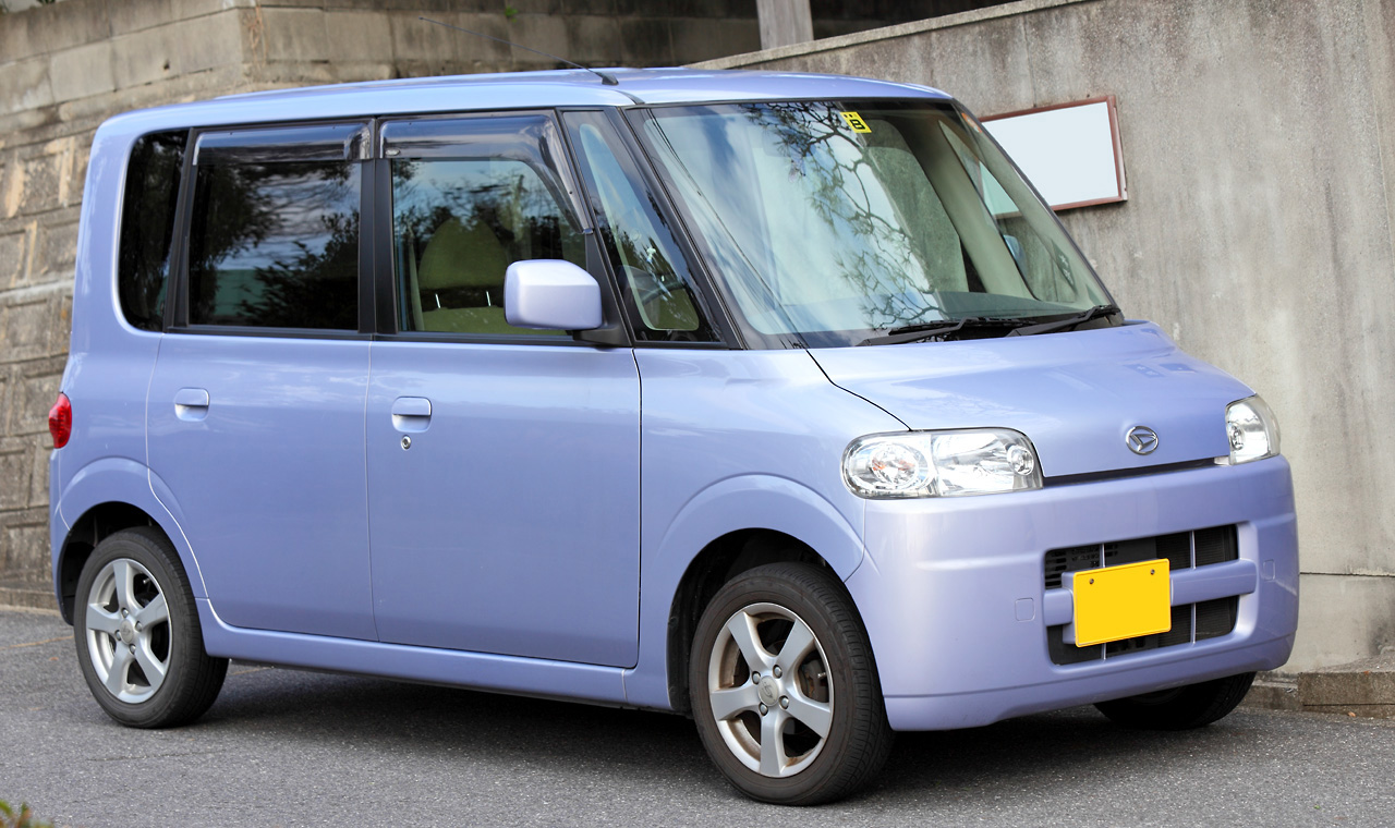 Daihatsu Tanto X (L350S, 2003/11 - 2005/06)